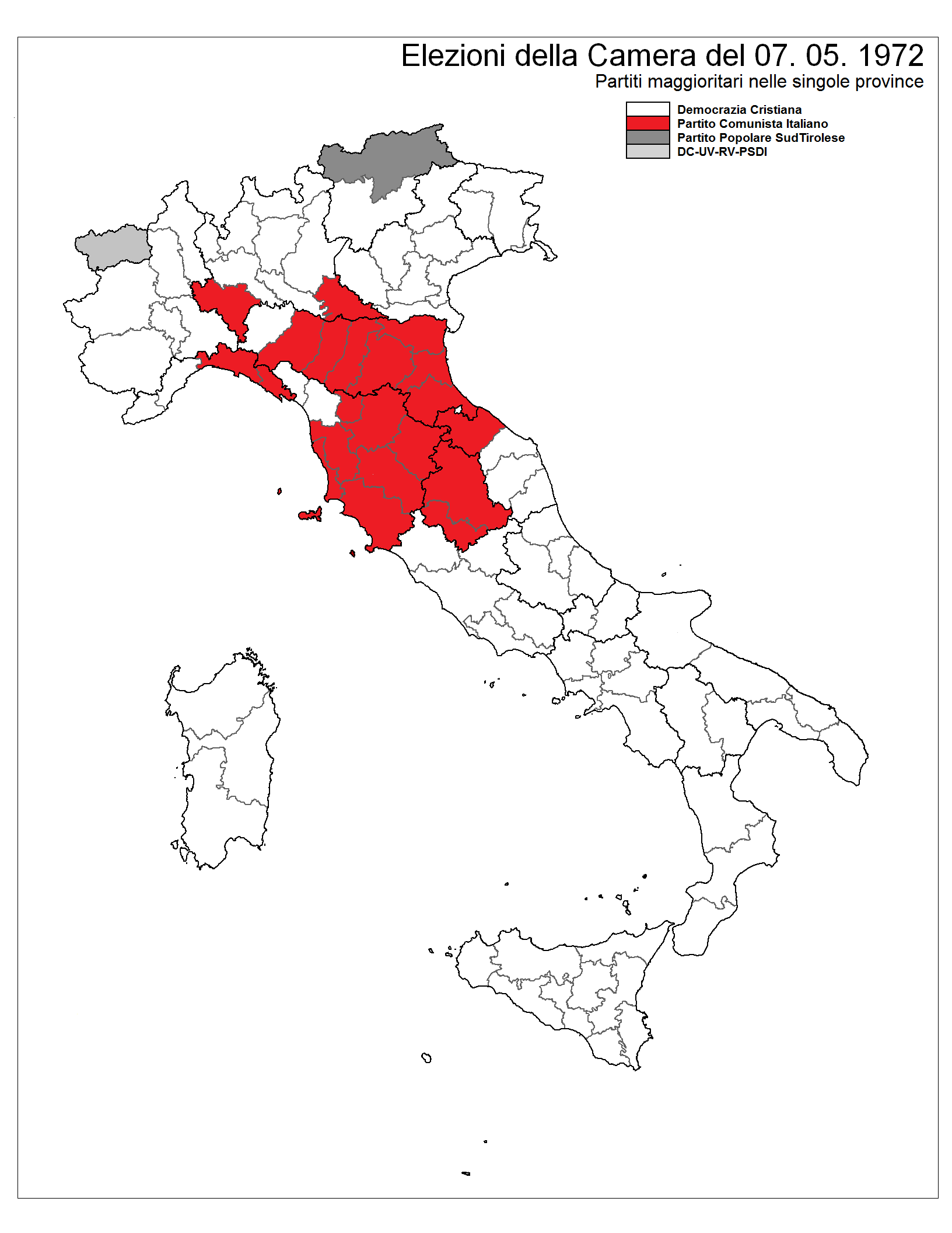 Partiti maggioritari nelle province, voto 1972 Licensing L'immagine l'ho fatta io.